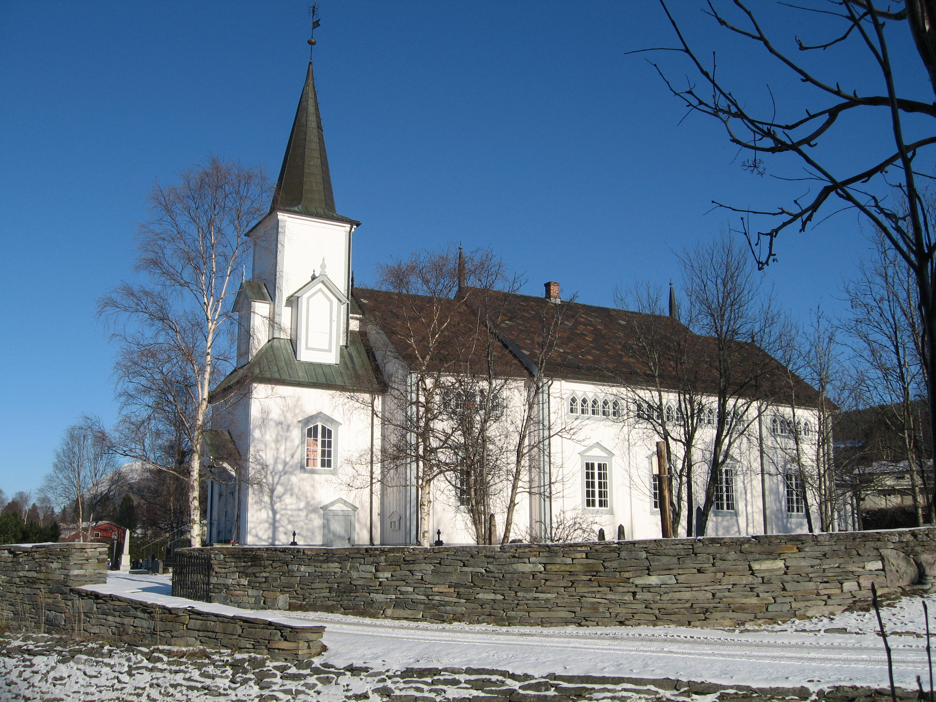 Alvdal kirke, Alvdal